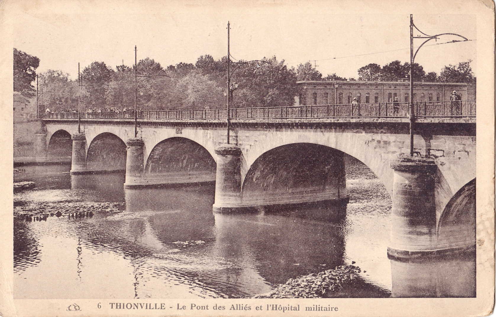 Carte postale ancienne éditée par CAP r(Compagnie des arts photomécaniques), n°6 :THIONVILLE - Le Pont des Alliés et l'Hôpital Militaire